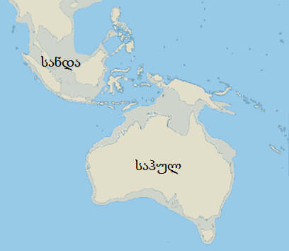 ავსტრალიის კონტინენტი ძველად